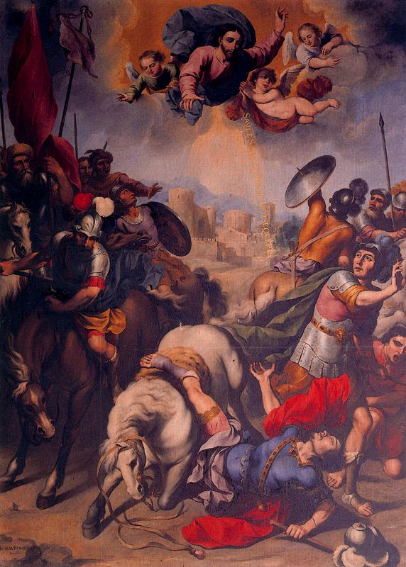 La obra representa el momento en que Jesucristo se apareció a Pablo de Tarso y en que este se convirtió al cristianismo.